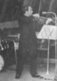 Quinteto de Ástor Piazzolla. Antonio Agri (violín). Michelángelo, 1970.